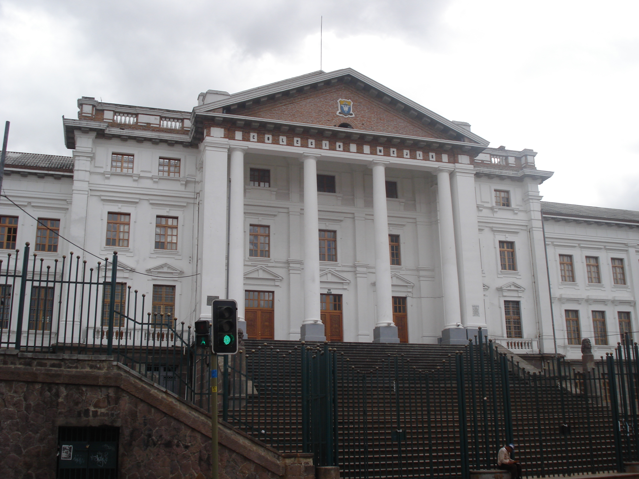 Edificio Central del Instituto Nacional Mejía, Vargas N13-93 y Arenas.